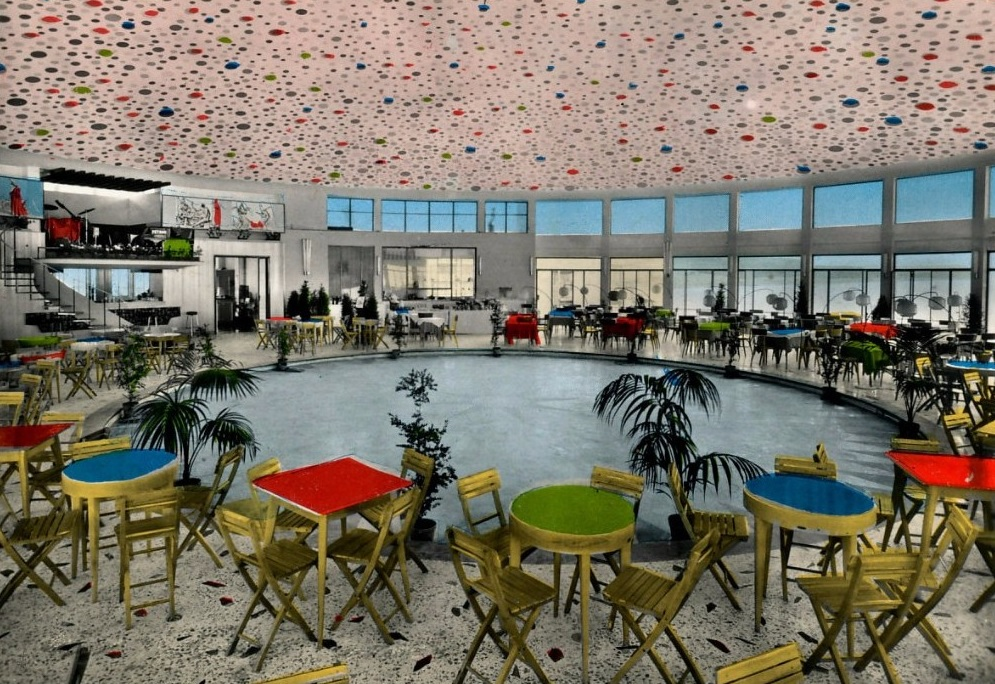 Lido La Conchiglia di Gela (interno)